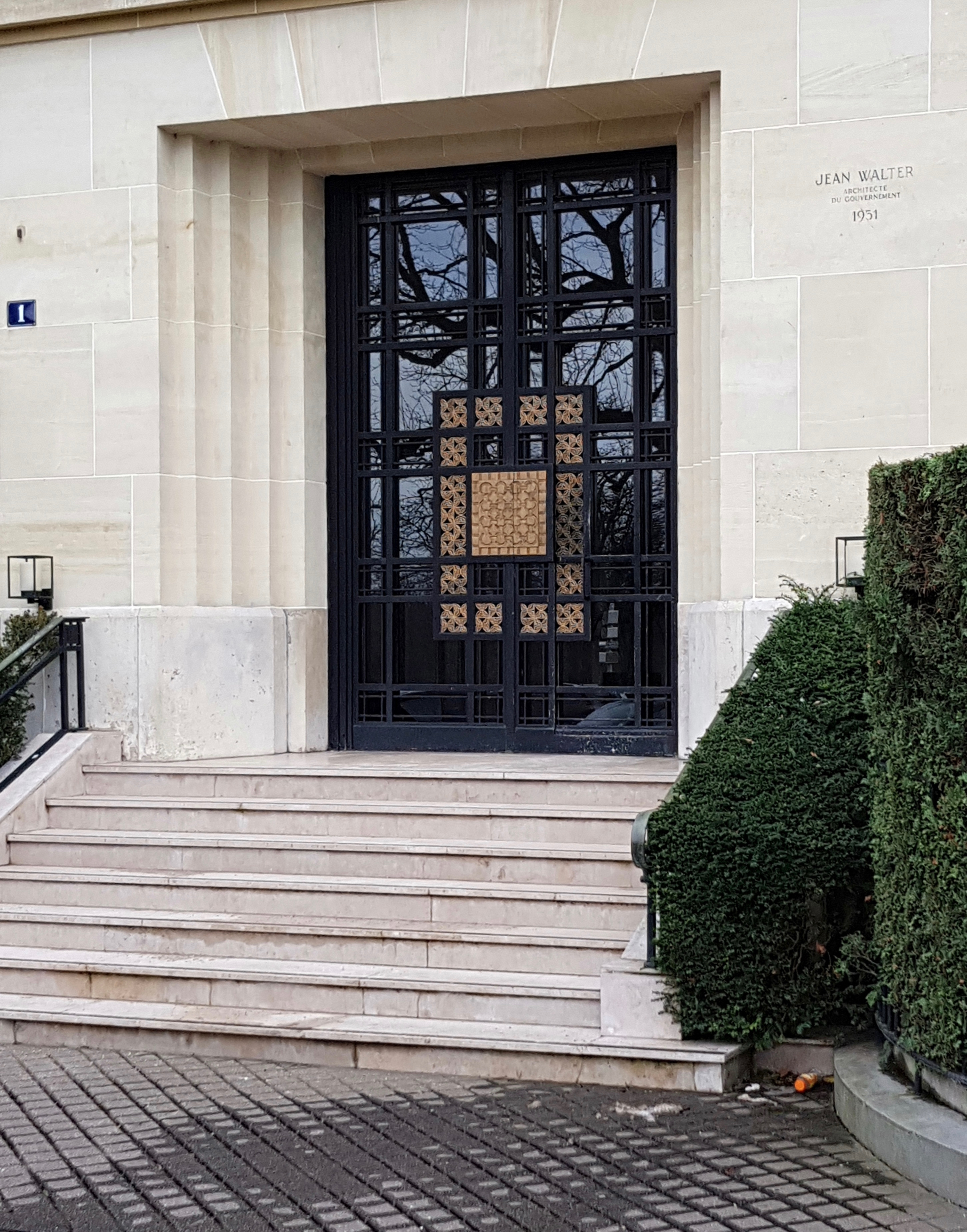 Immeubles Walter : entrée au n° 1 avenue du Maréchal-Maunoury, Paris XVIe.